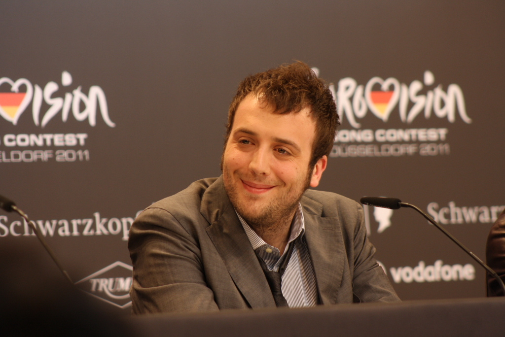 Italian singer and pianist Raphael Gualazzi